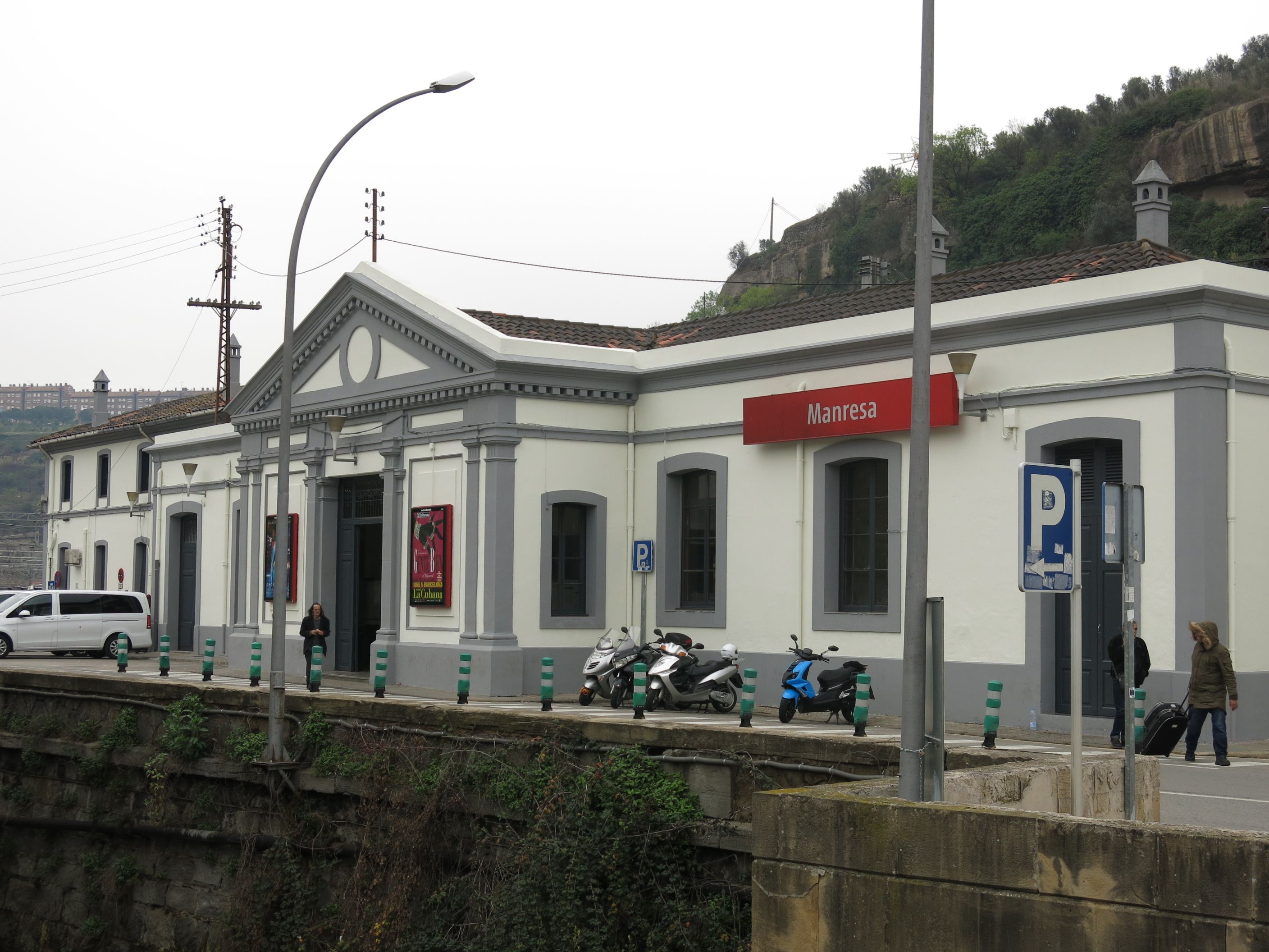 Estació de Manresa (Renfe)